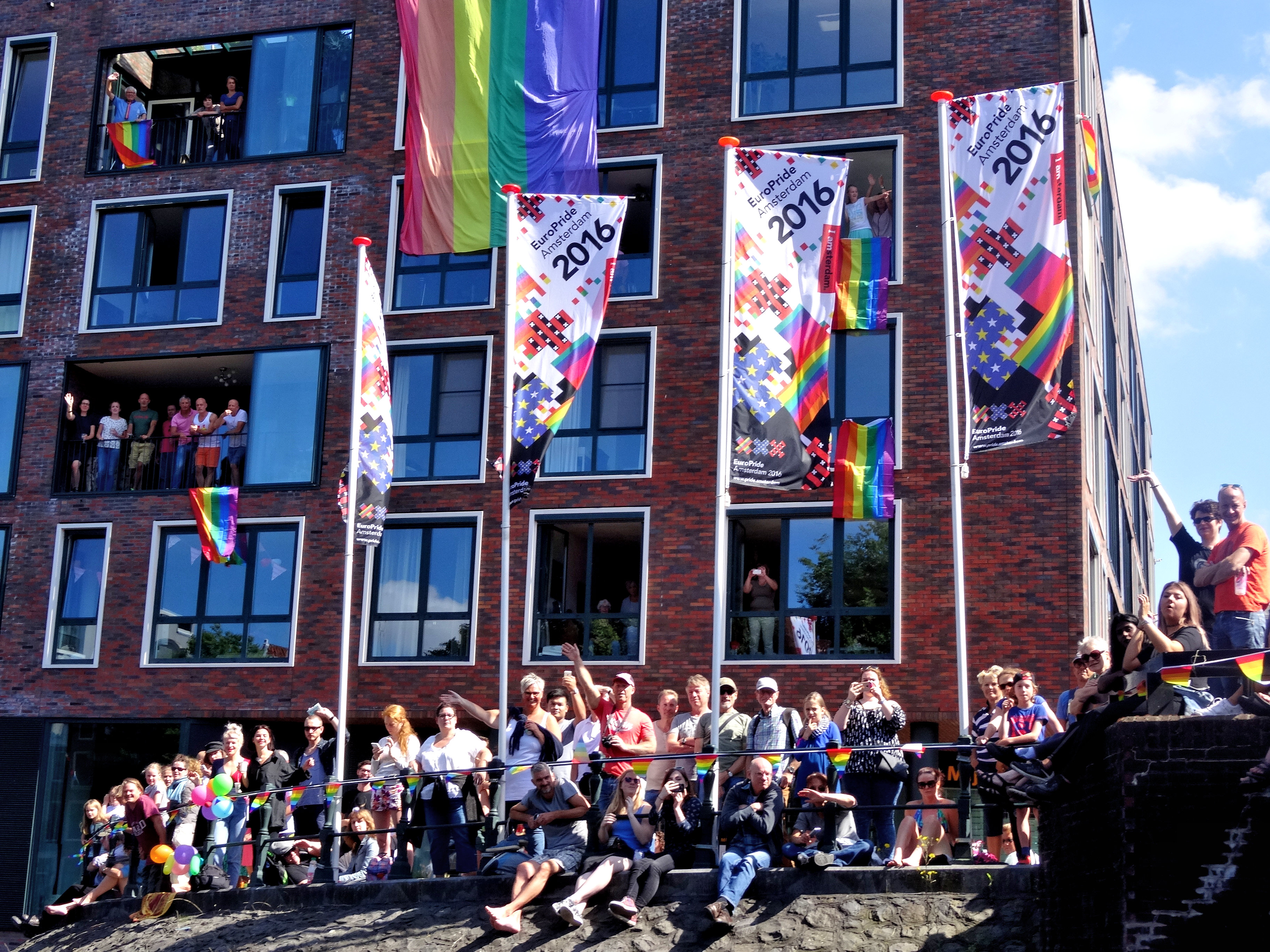 Impression of the Canal Parade at EuroPride in Amsterdam 2016